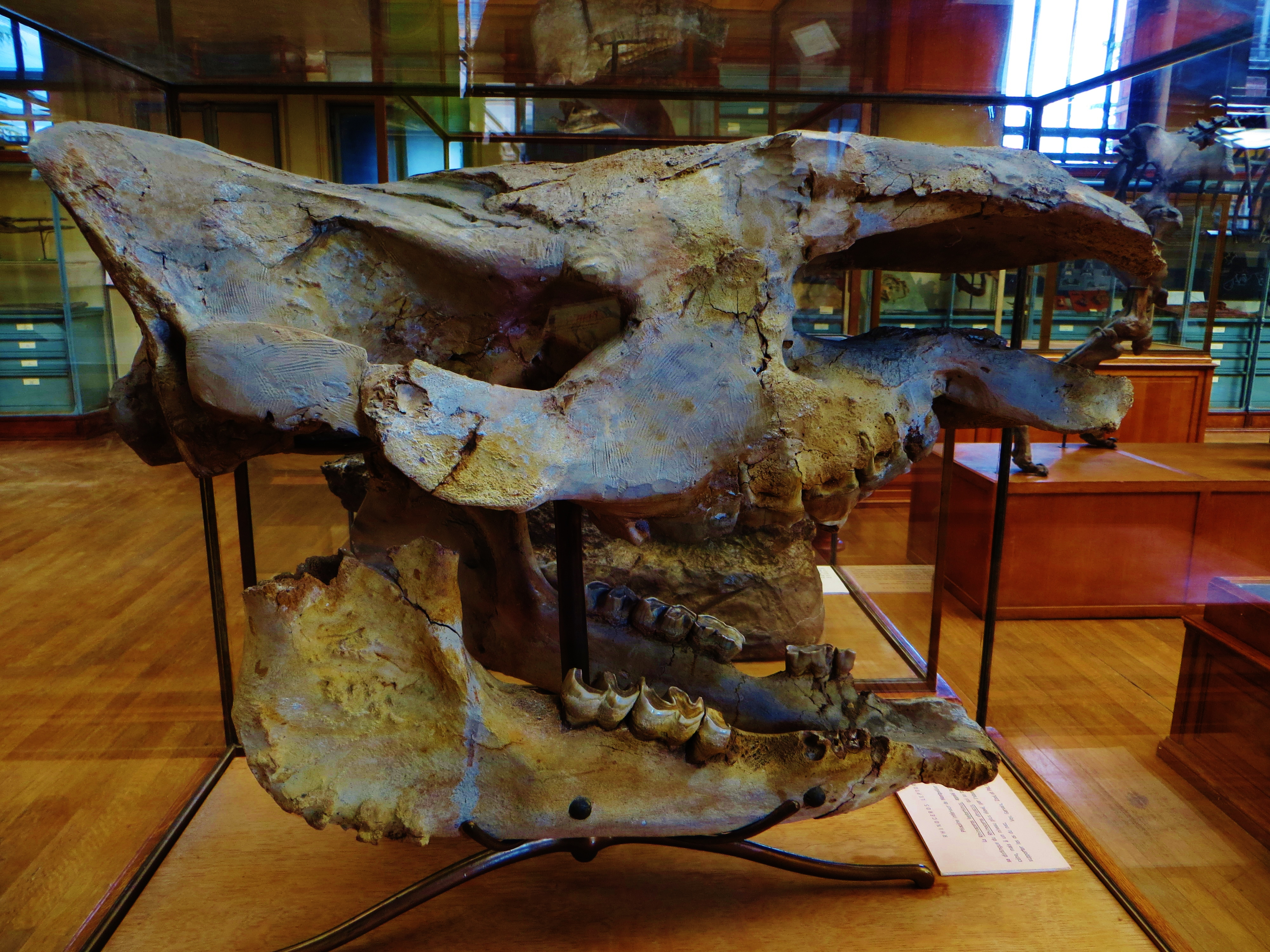 Fossil of Rhinoceros, an extinct mammal - Took the photo at Musee d'Histoire Naturelle, Paris